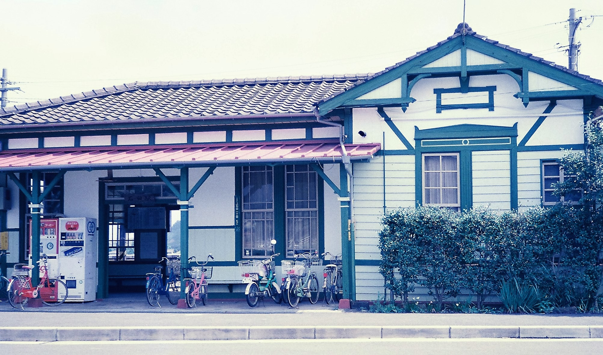 日田彦山線石田駅の旧駅舎（1987年8月）